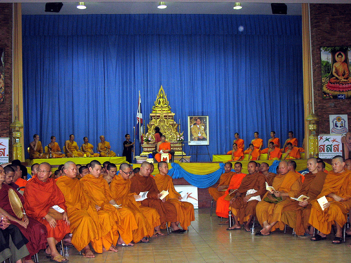 INEB Konferenz 2009 in Chiang Mai, Thailand, Vorbereitung zum zweistündigen Friedensgebet.